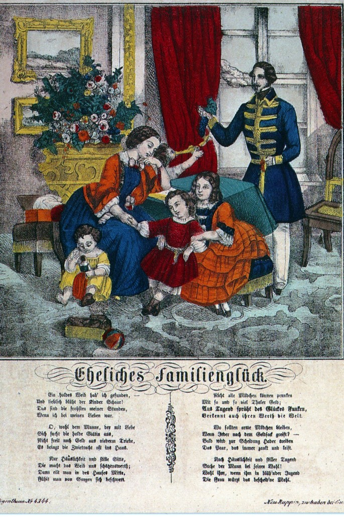 Eheliches Familienglück (Neuruppiner Bilderbogen kol.Kreidelithographie ca.1860-1870)